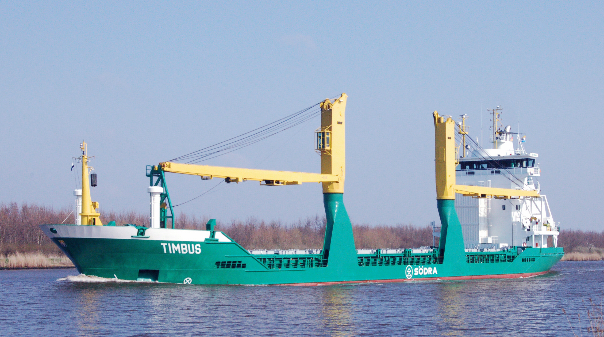 Das Frachtschiff M/V Timbus IMO-Nummer: 9198680 MMSI-Nummer: 211317180 Rufzeichen: DIBC Länge: 100.0m Breite:17,0m Flagge: Germany